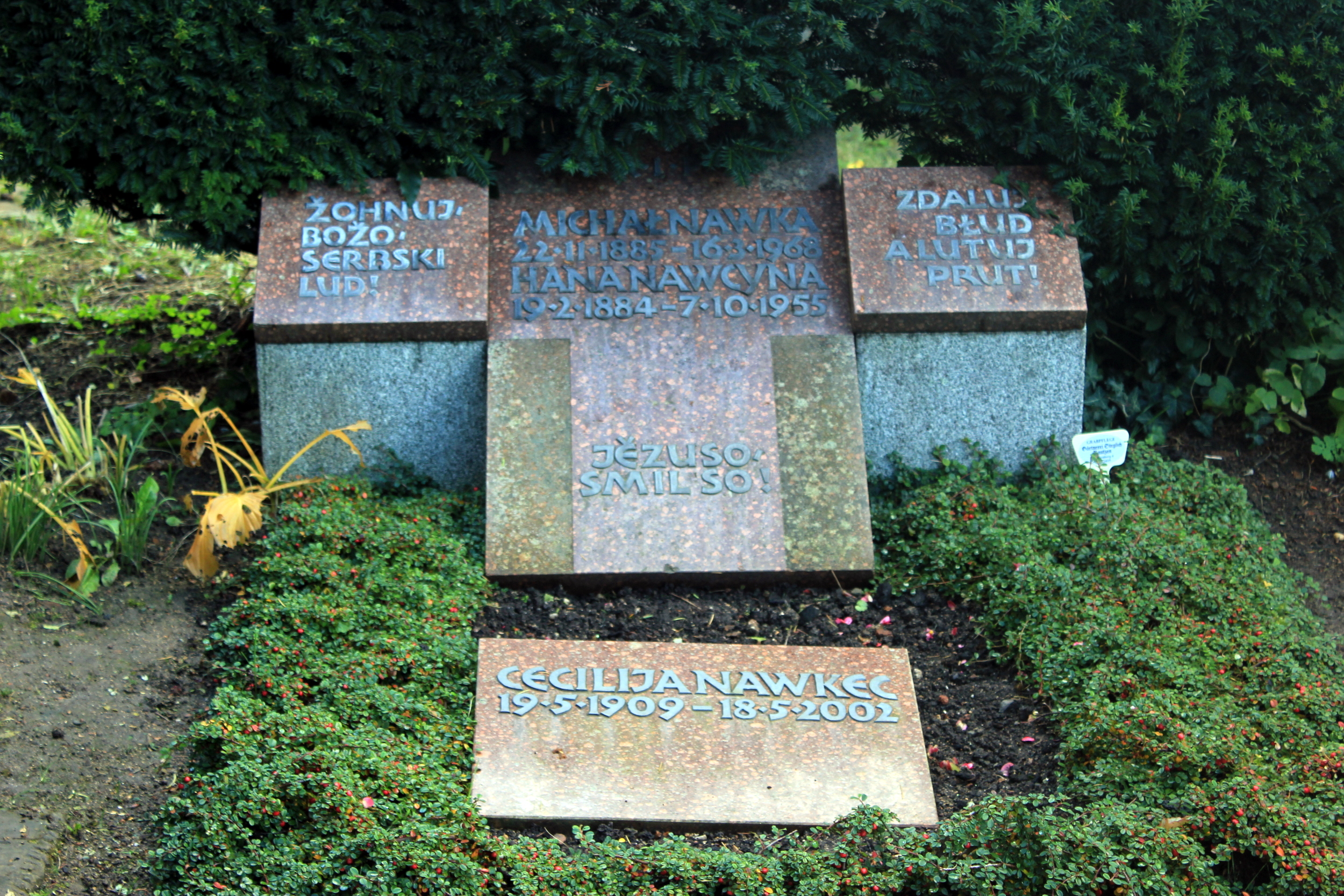 Hornjoserbsce: Row Michała Nawki na Budyskim Mikławšku.